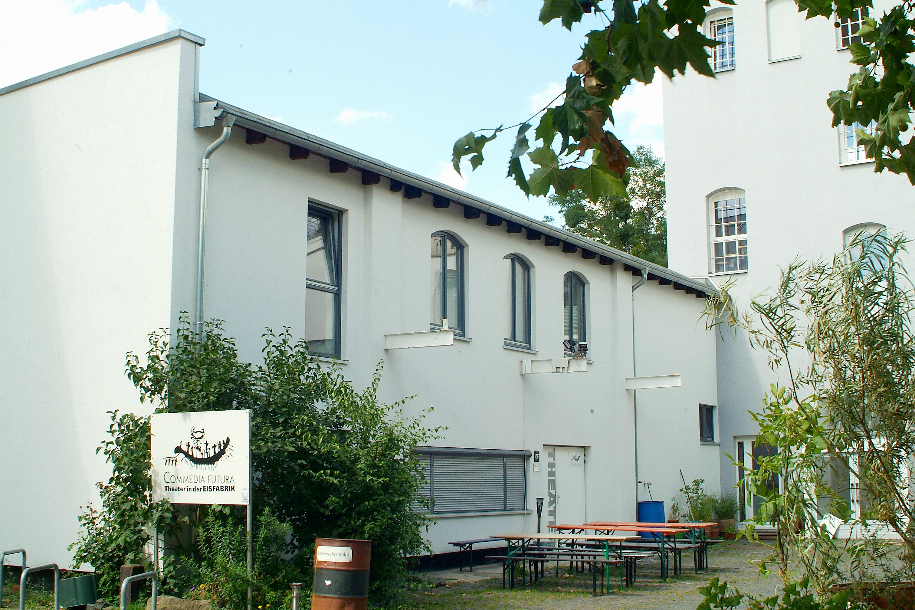 Alte Beleuchtungskörper mit Wetterschutzglas und Glühbirne an der Aussenwand im Hof des Kulturzentrums Eisfabrik in der Südstadt von Hannover ...